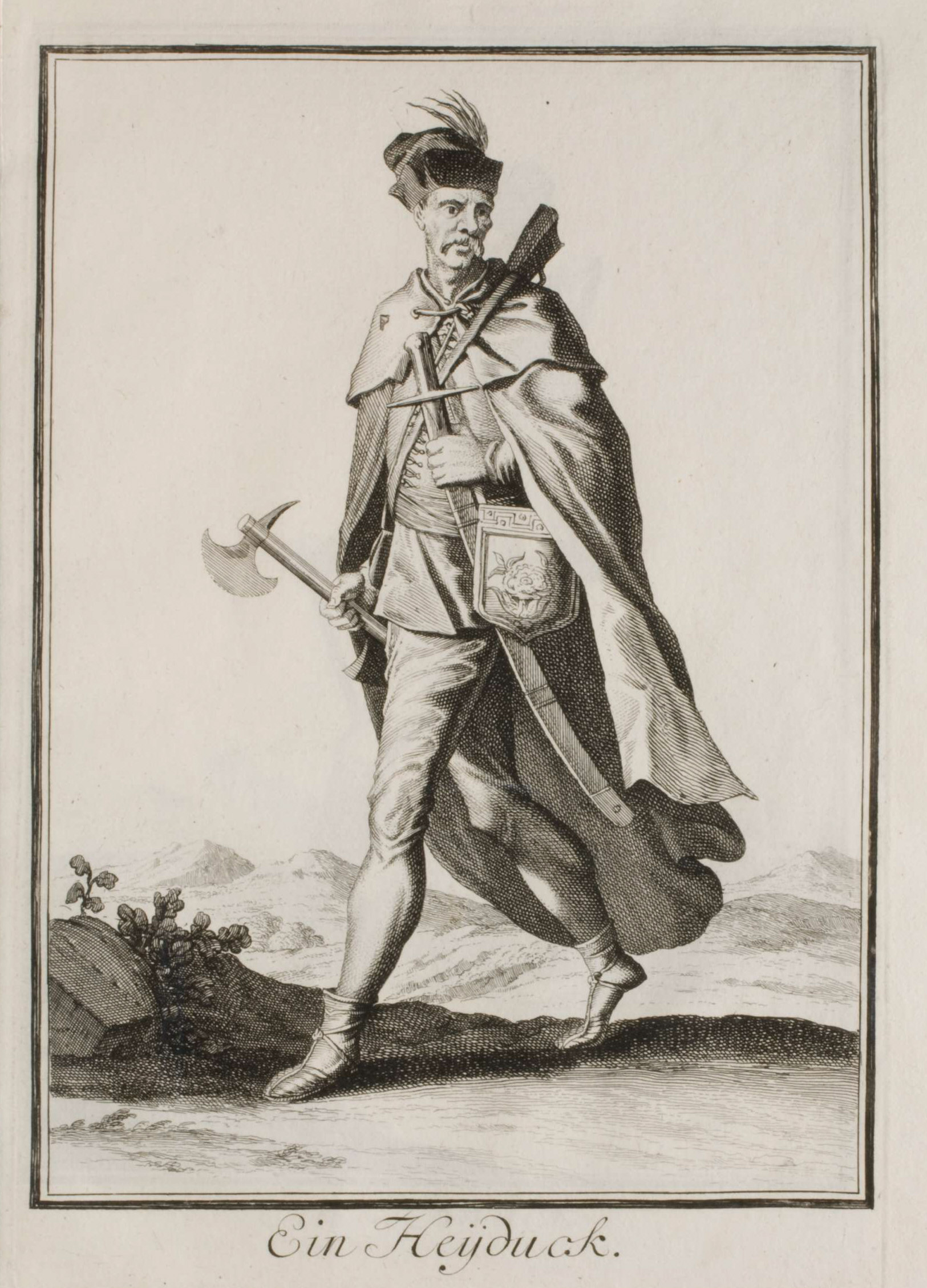 Neu-eröffnete Welt-Galleria. ..., Nürnberg 1703. 63. Ein Heyduck.